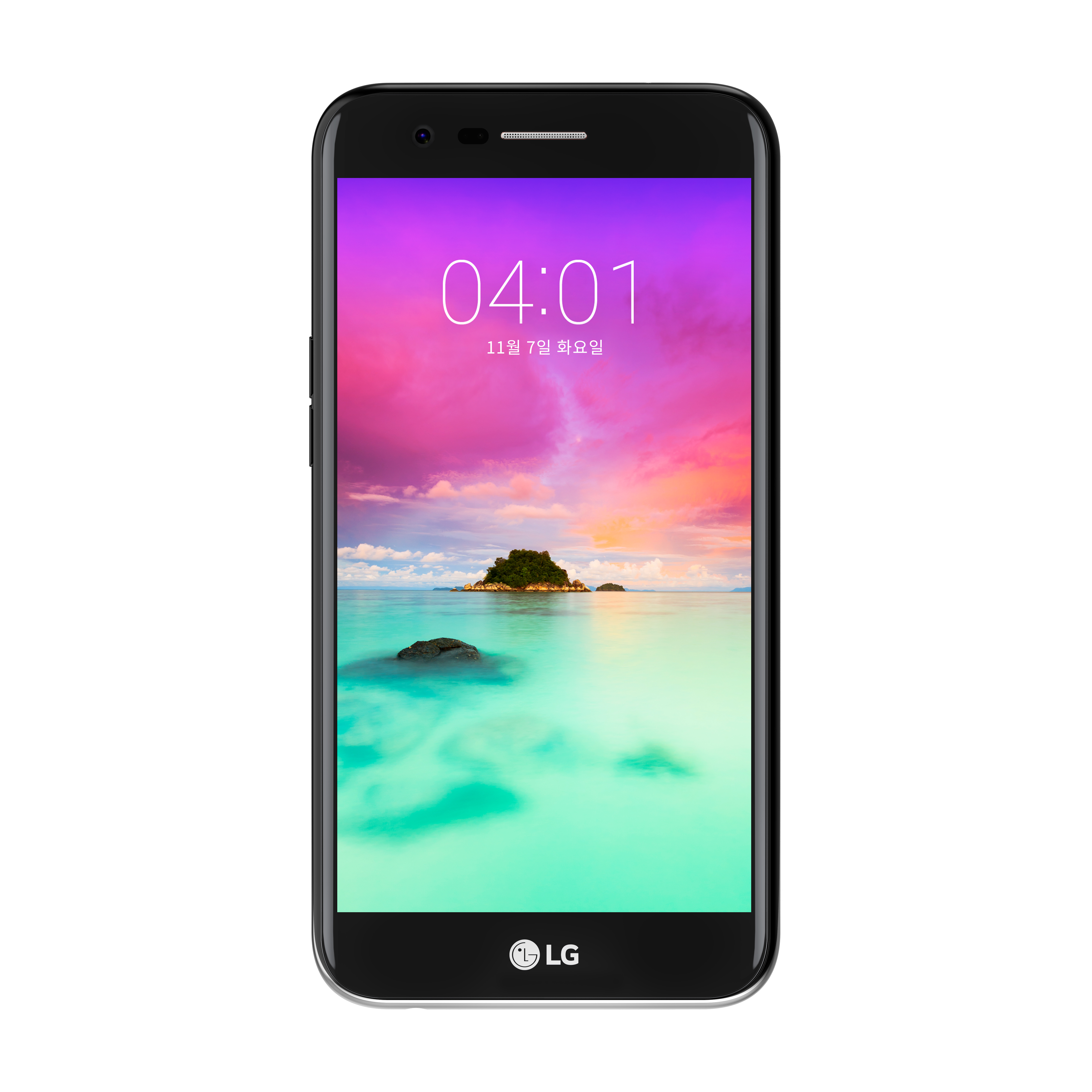 LG전자가 7일 세련된 디자인에 전면 광각 카메라를 장착한 실속형 스마트폰 LG X401을 출시한다. SK텔레콤과 LG유플러스를 통해 출시하는 이 제품은 전면에 500만 화소의 120도 광각 카메라를 탑재한 것이 특징이다.